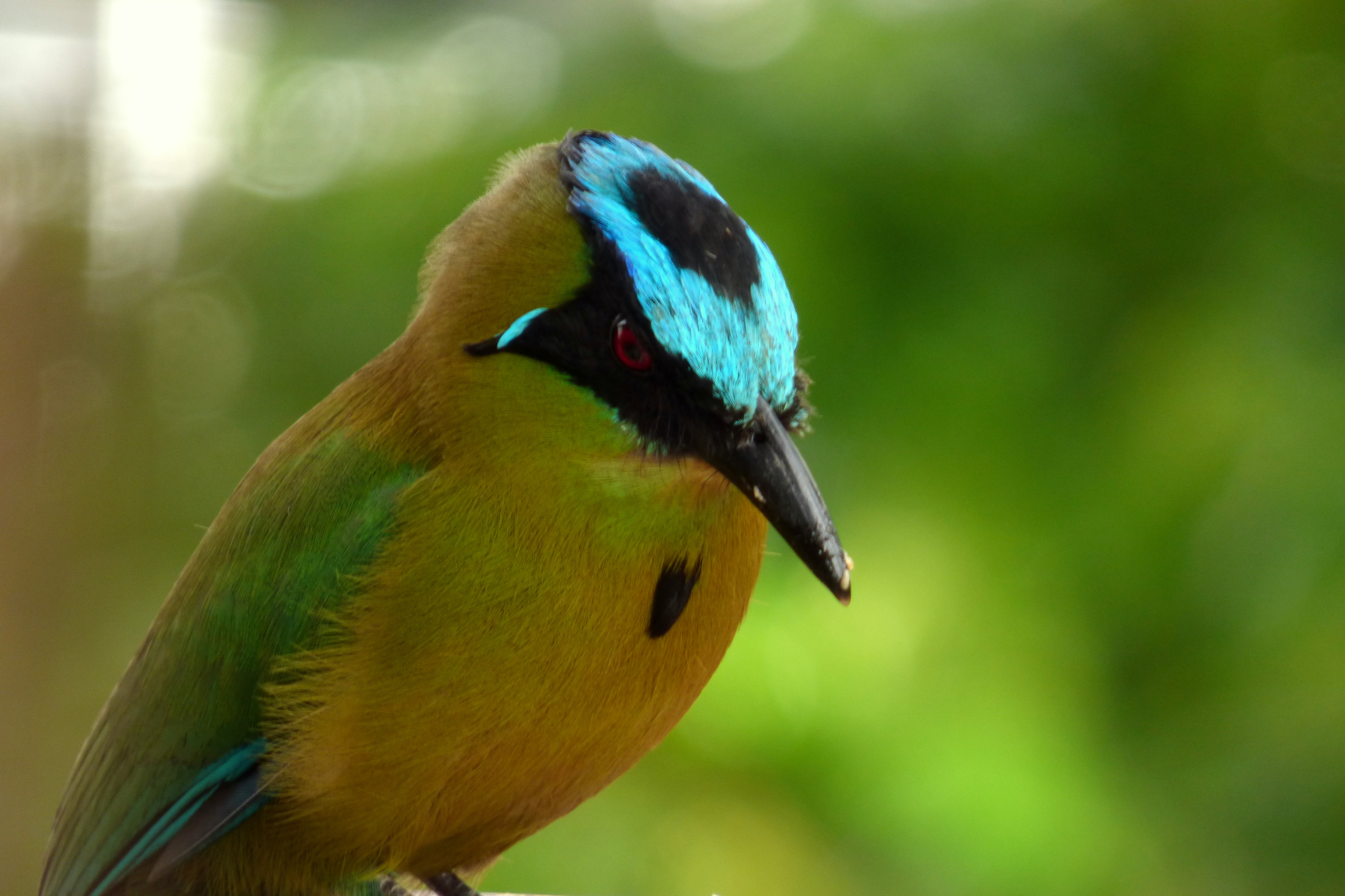 Momotus aequatorialis (Barranquero coronado)